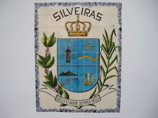 Brasão da Cidade de Silveiras em azuleijo na parede da prefeitura municipal.